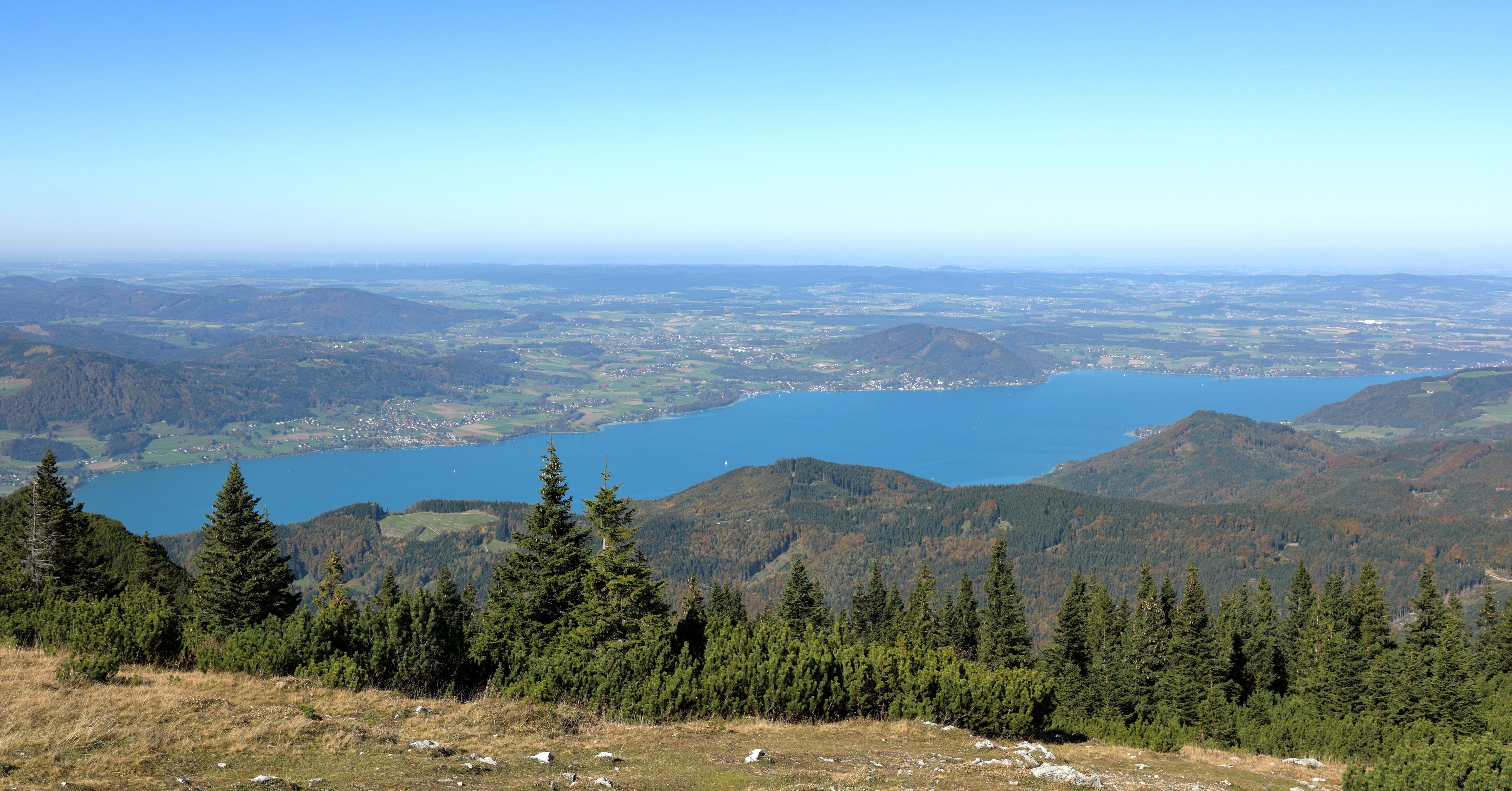 Südostansicht des Attersees bzw. Blick vom Hochleckenhaus auf den Attersee.Er ist mit über 46 km² Wasserfläche der größte zur Gänze in Österreich liegende See, hat eine Länge von fast 19 km und eine Breite von 1,25 bis 3,3 km. Mit 169 Metern ist er der dritttiefste See der Alpenrepublik und übertrifft mit einem Wasservolumen von fast 4 Mrd. m³ viele flächenmäßig größere Seen.